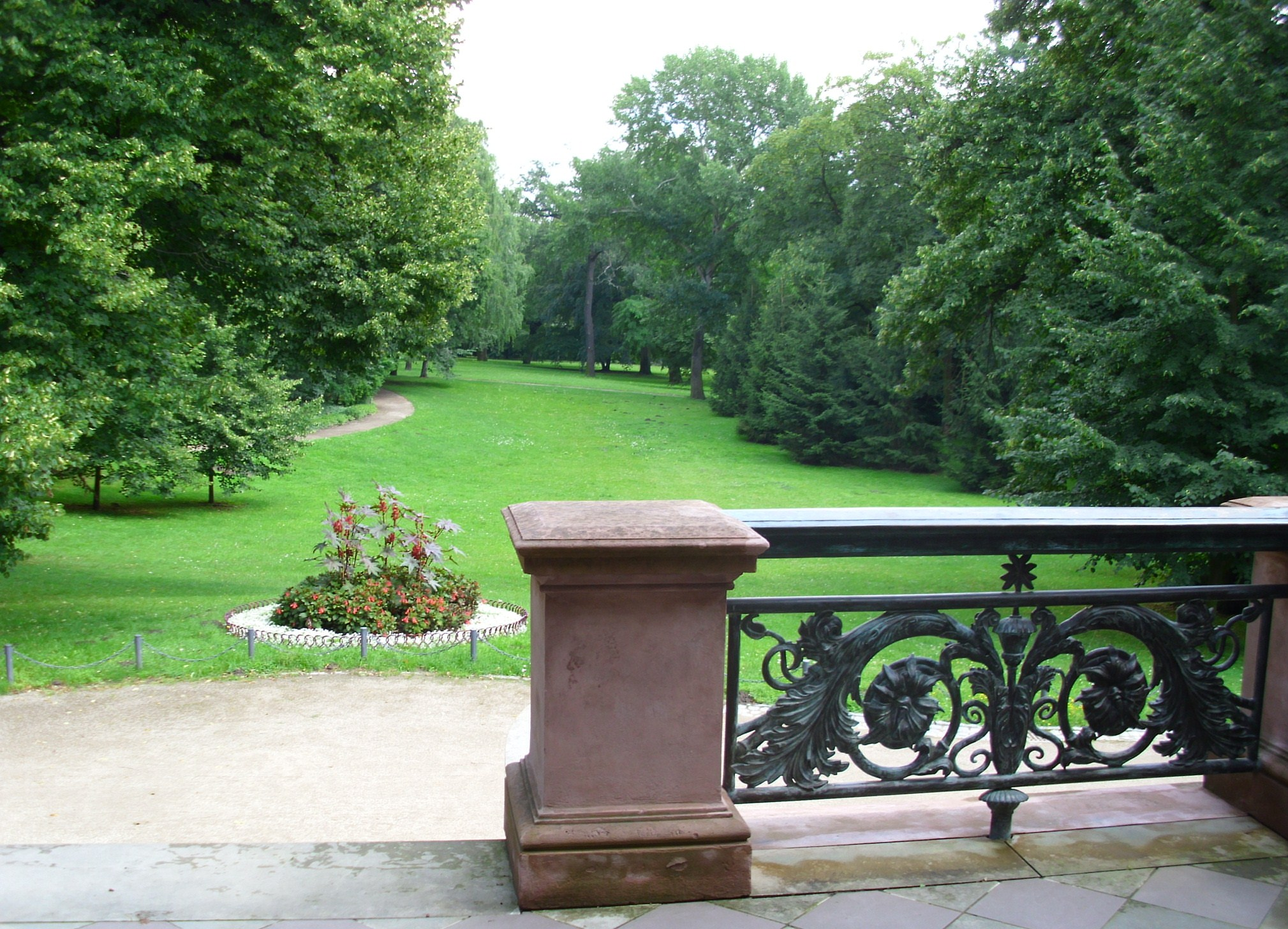 Blick vom Schloss Biesdorf in den denkmalgeschützten Schloßpark